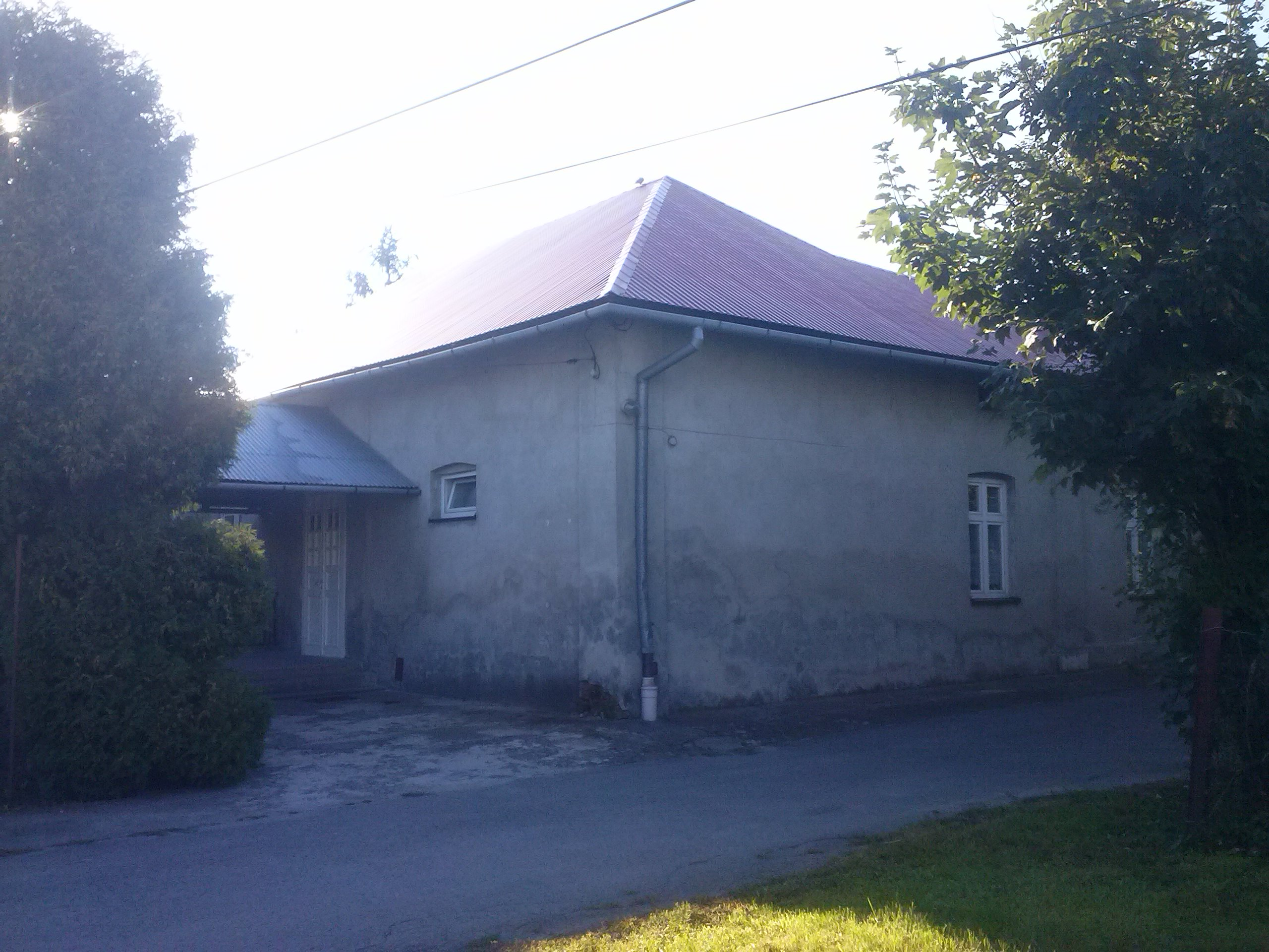 Budynek dawnej szkoły podstawowej, obecnie Dom Kultury